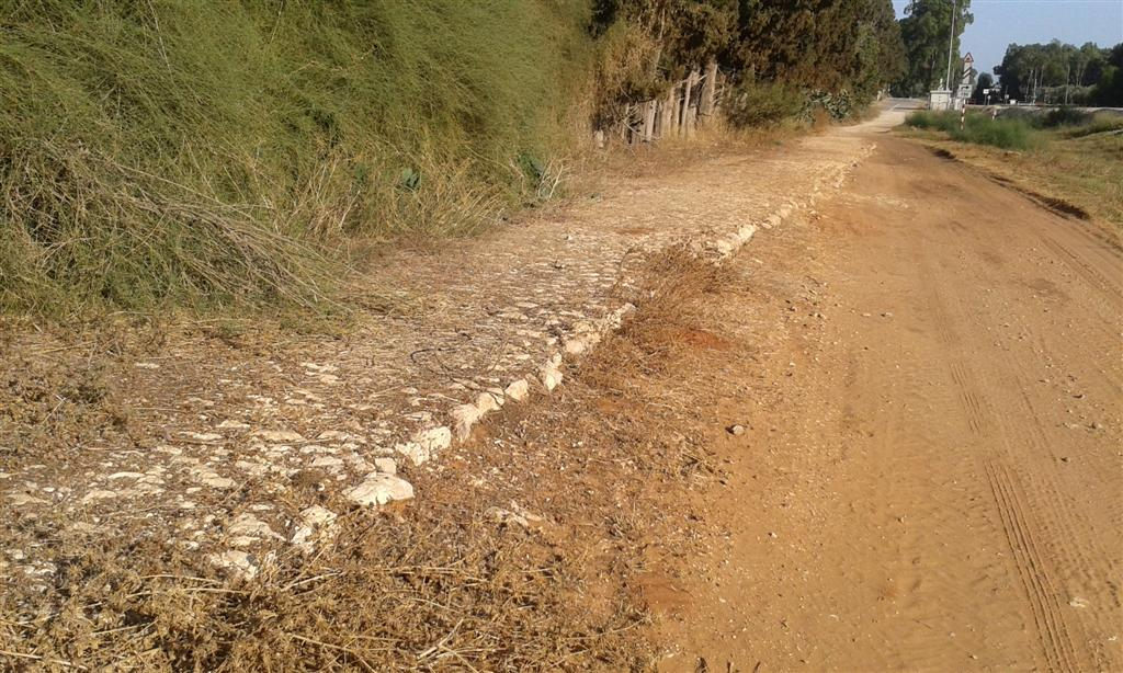 דרך סולינג ממערב לתחנת הרכבת חדרה מזרח. מדרום לקיבוץ גן שמואל